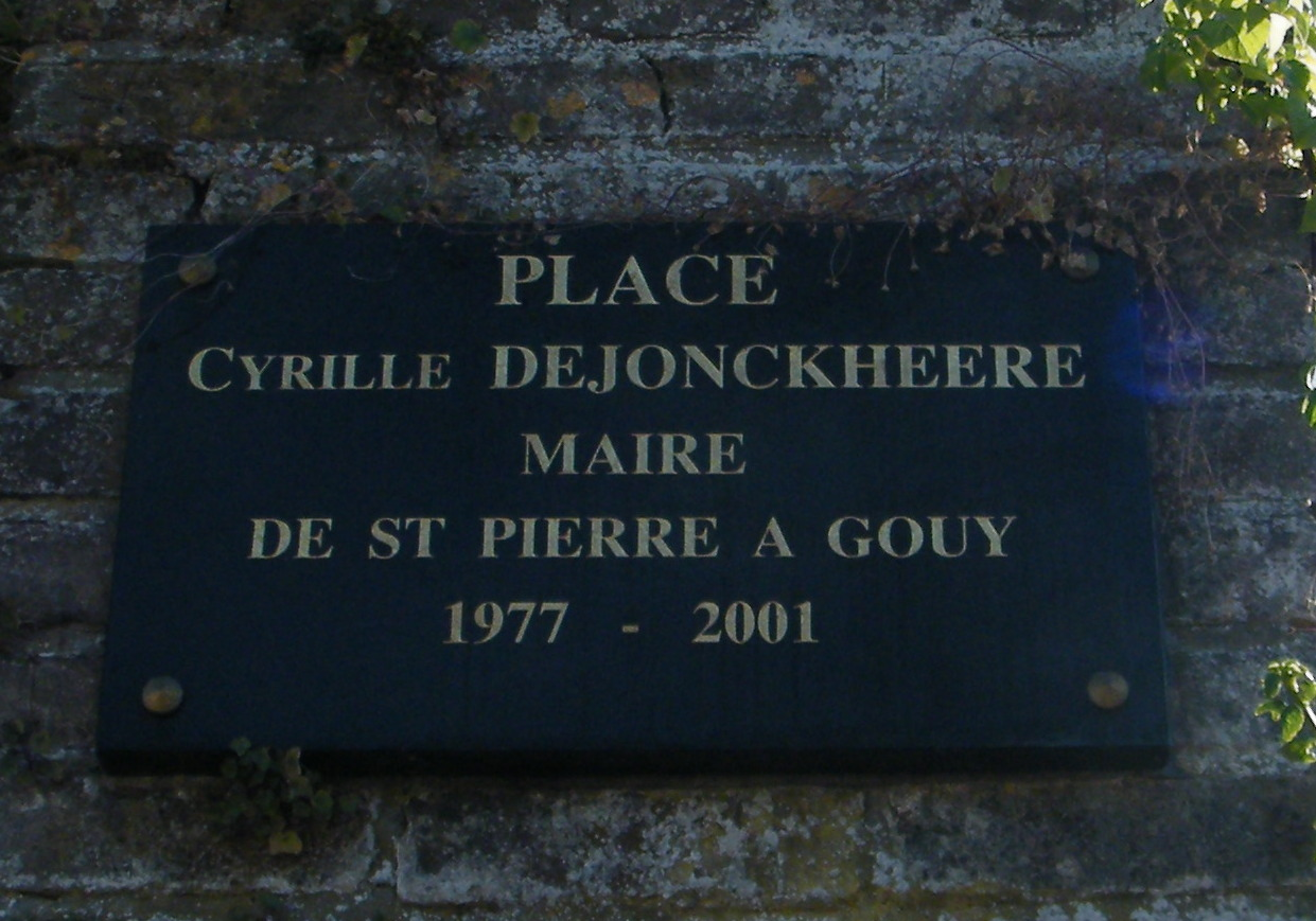 Crouy, St-Pierre-à-Gouy (Somme, Fr), plaque commémorative, dernier maire.